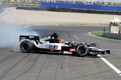 Christijan Albers, Zandvoort demo, 2005